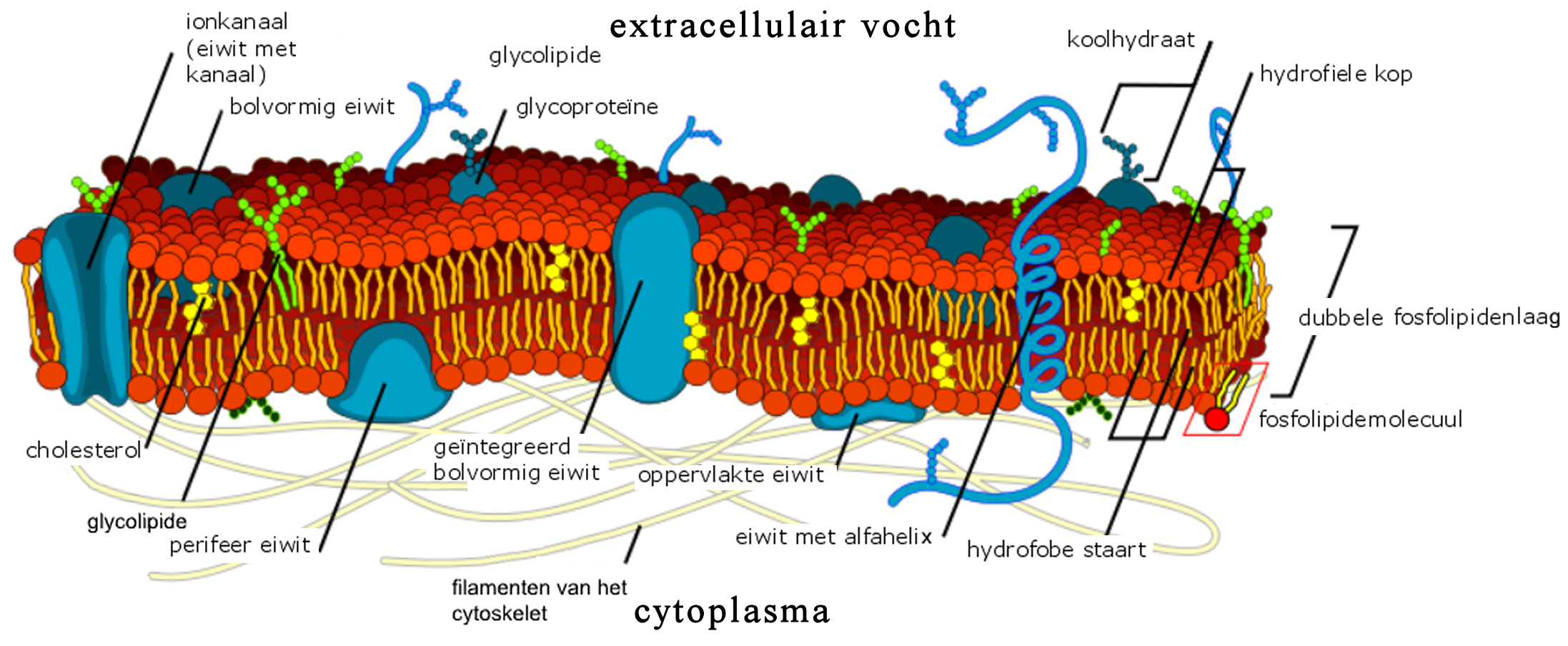 Gedetailleerde voorstelling van een celmembraan, met intrinsieke eiwitten, matrix en dubbele eiwitlaag.